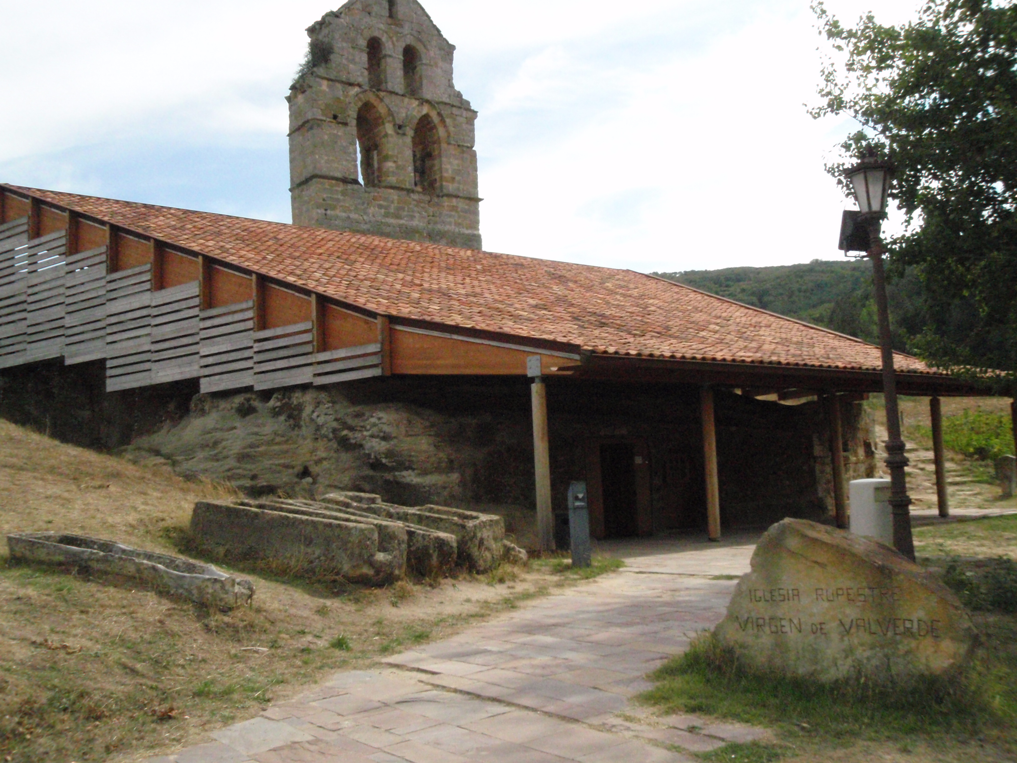 Walon: exterior de la Ermita Rupestre Virgen de Valverde, en Valderredible, Cantabria. La ermita está labrada en la roca.